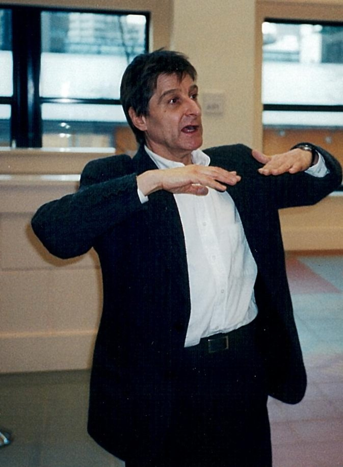 Wim T. Schippers